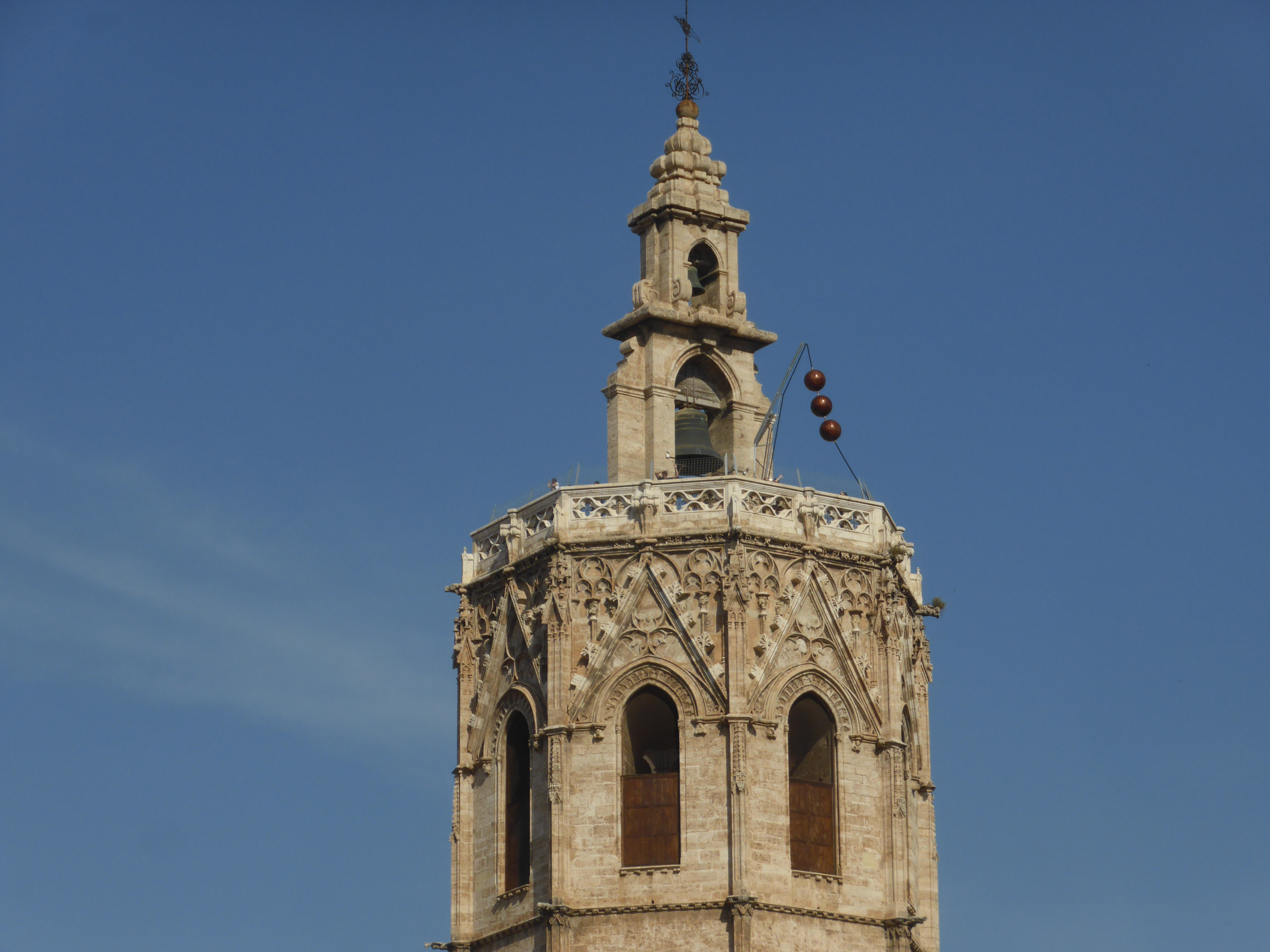 Recreación histórica del "Telégrafo Portuario del Micalet", compuesto por tres esferas de cuero -de un metro de diámetro- ensartadas en un cable. Torre del Miguelete. Catedral de Valencia. España.